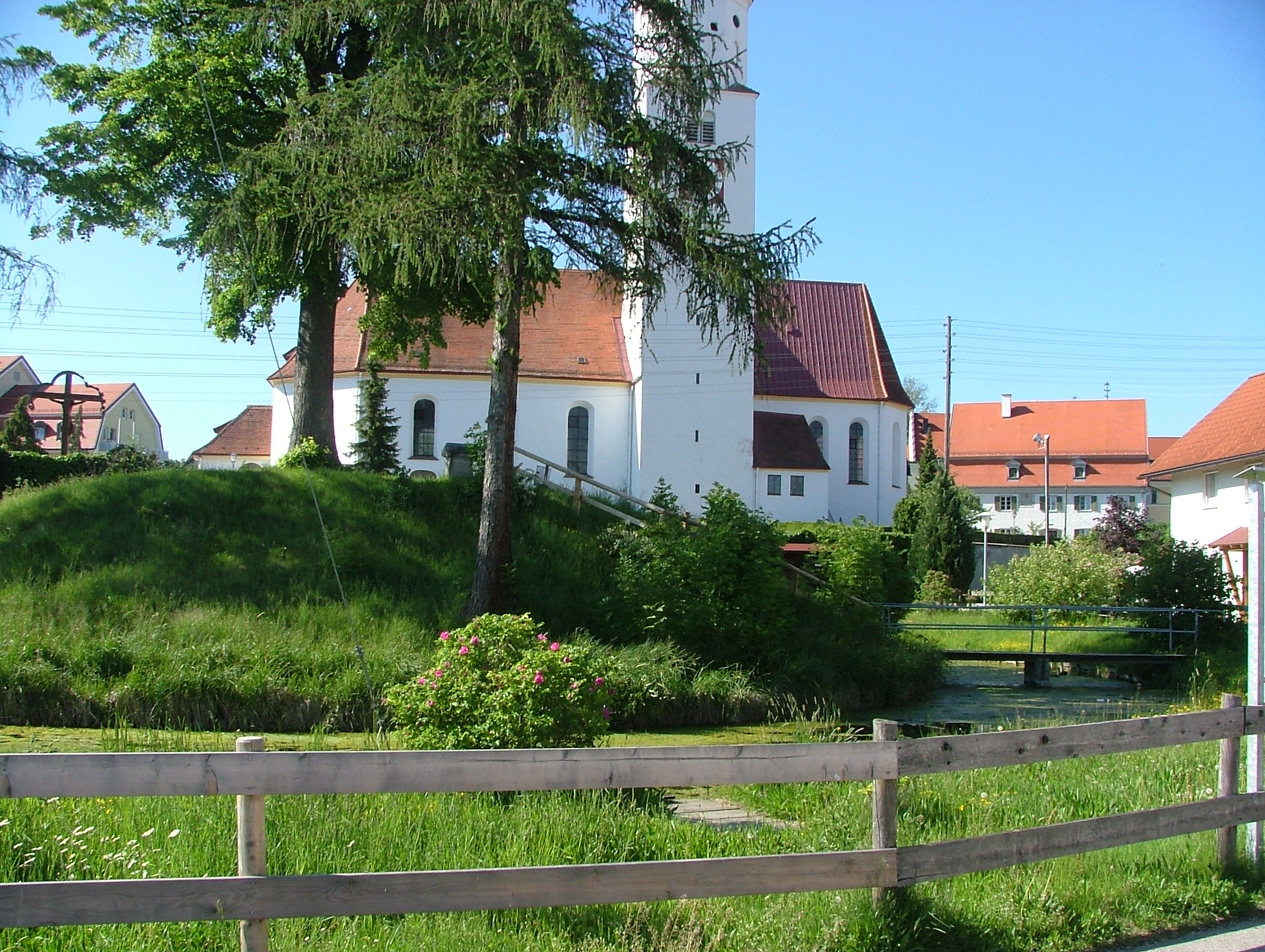 Inselweiher